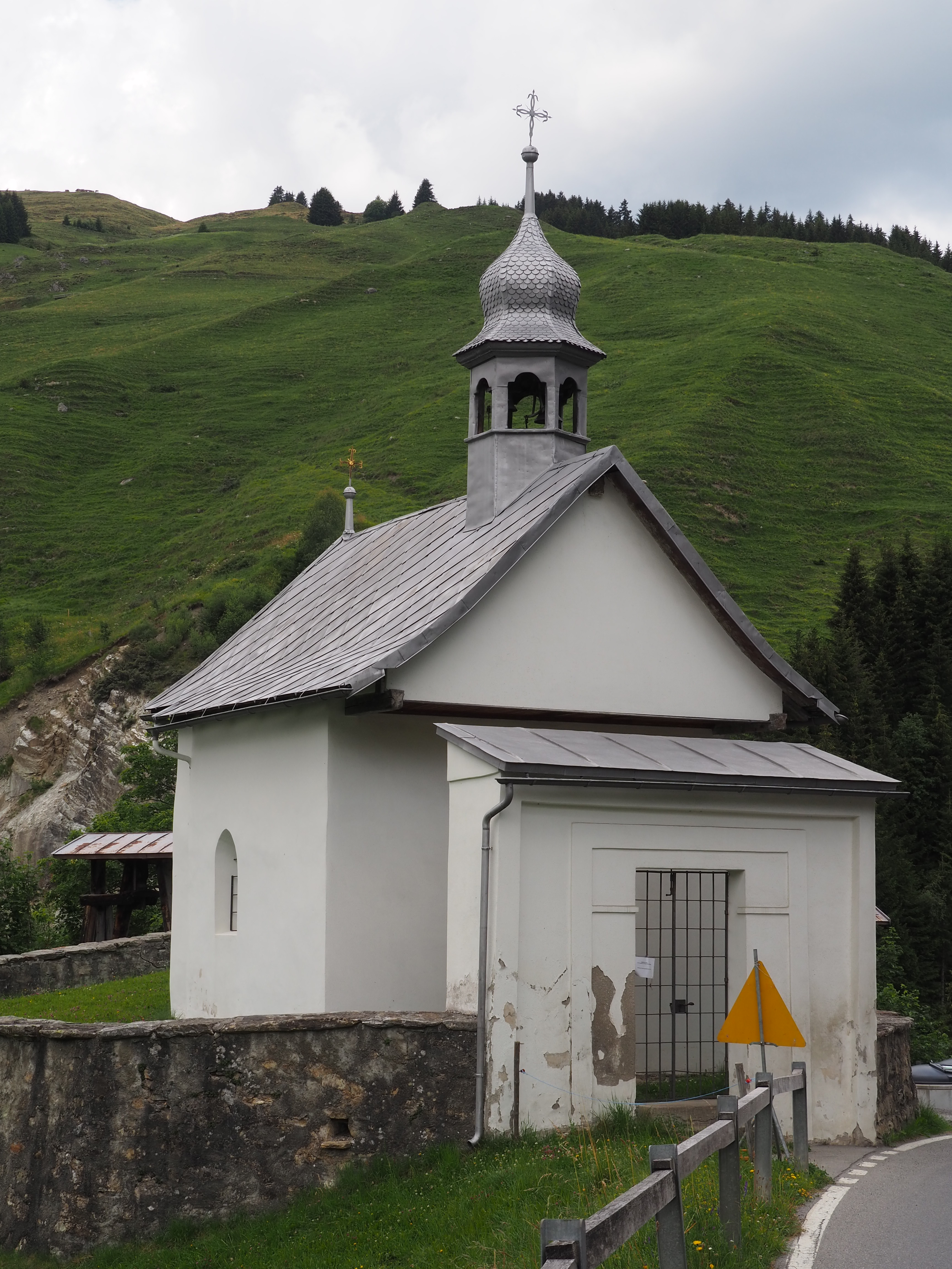 Kapelle Sogn Roc, Lumbrein (Lumnezia, Surselva, Graubünden, Schweiz)